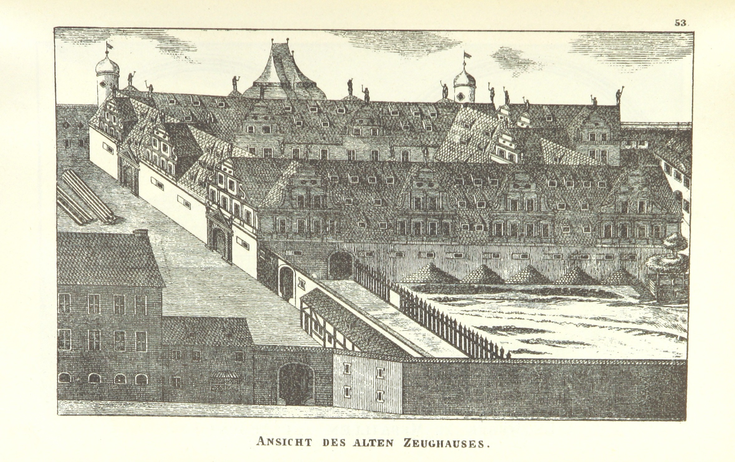 Kupferstich aus der Chronik von Anton Weck, 1679